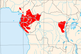 Gorilla distribution